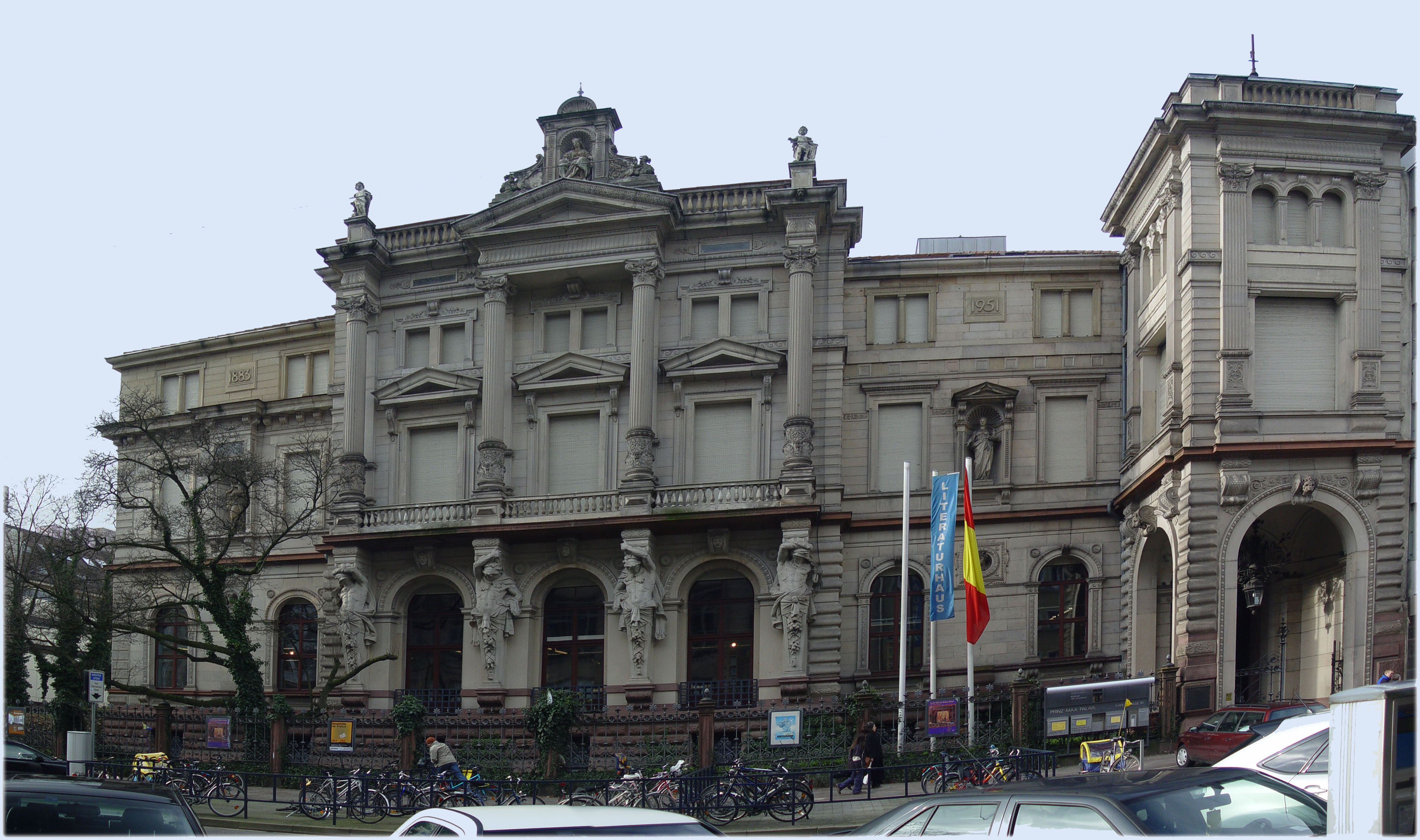 Gemeinfrei, fotographiert von Martin Dürrschnabel Motiv: Prinz-Max-Palais aus Karlsruhe Frontansicht Kamera: DSC-F717 Das Bild ist aus mehreren Teilaufnahmen zusammengesetzt.